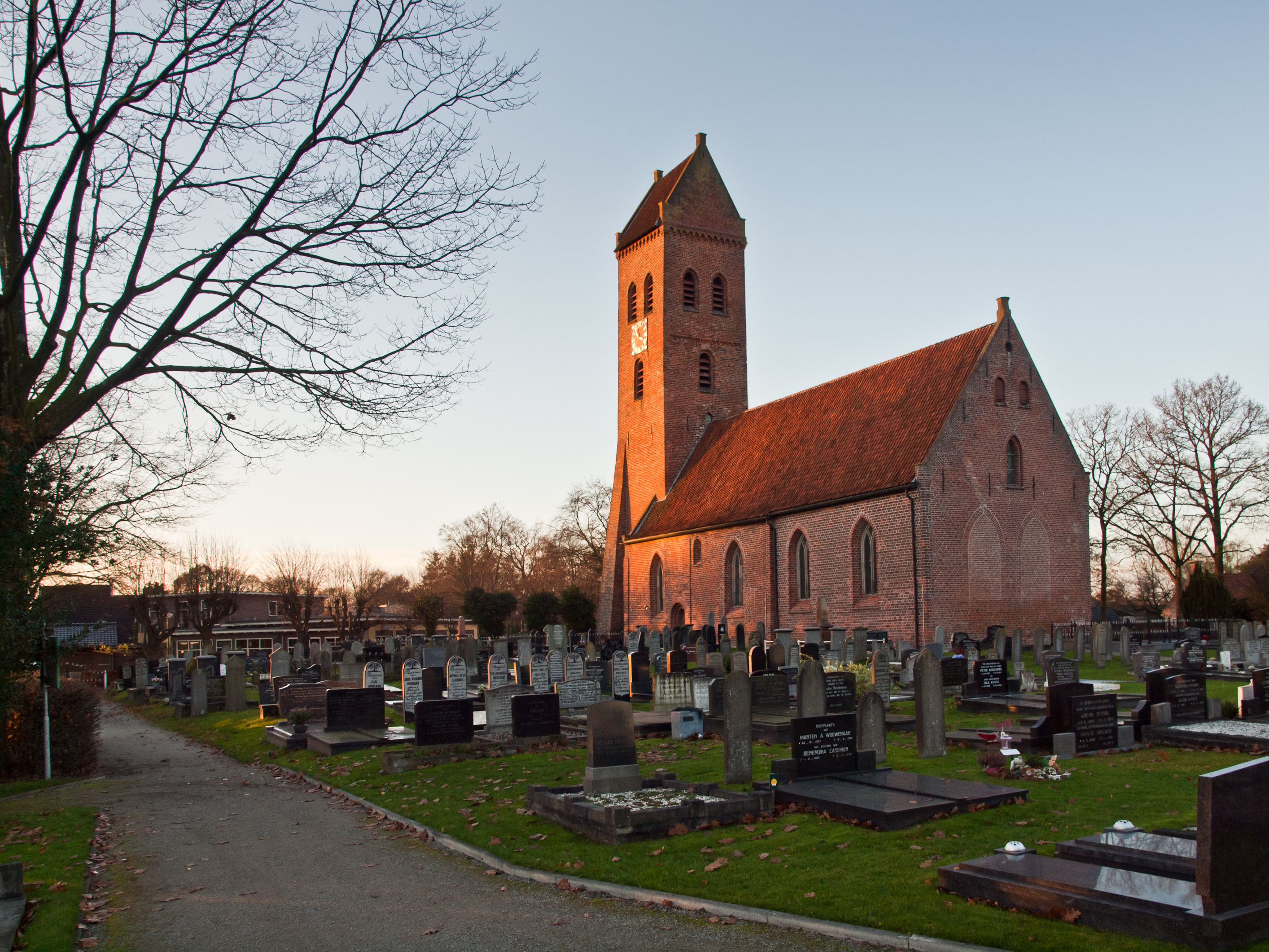 De kerk van Midwolde nabij leek. Onderstaande tekst staat op een bordje naast de kerk. Kerk en toren gebouwd in de tweede helft van de 12de eeuw, Het koor mogelijk in de 13de eeuw. Toren in de 16de eeuw verhoogd. Belangrijke inrichting: preekstoel van Allert Neijer en Jan de Rijk, 1711-1714; avondmaalstafel uit eerste kwart van de 18de eeuw; hoge herenbank met portaal uit 1660. 10 rouwborden voor leden van de geslachten Van Ewsum en Ban In- en kniphuisen. Beroemd grafmonument van Rombout Verhulst, 1665-1669, ter nagedachtenis van Carl Hieronymous van In- en Kniphuisen. Orgel door Levinus Eekman, 1630, omstreeks 1660 door Andreas de Mare vergroot. De aanblik van de kerk wordt vooral uitwendig door de restauratie van 1811-1913 bepaald; inwendig werd toen het houten tongewelf aangebracht. Kerk en toren zijn sinds 1971 eigendom van de Stichting Oude Groninger Kerken. (Prins Bernhard Fonds / Anjer fondsen / Cultuurfonds voor Nerderland)